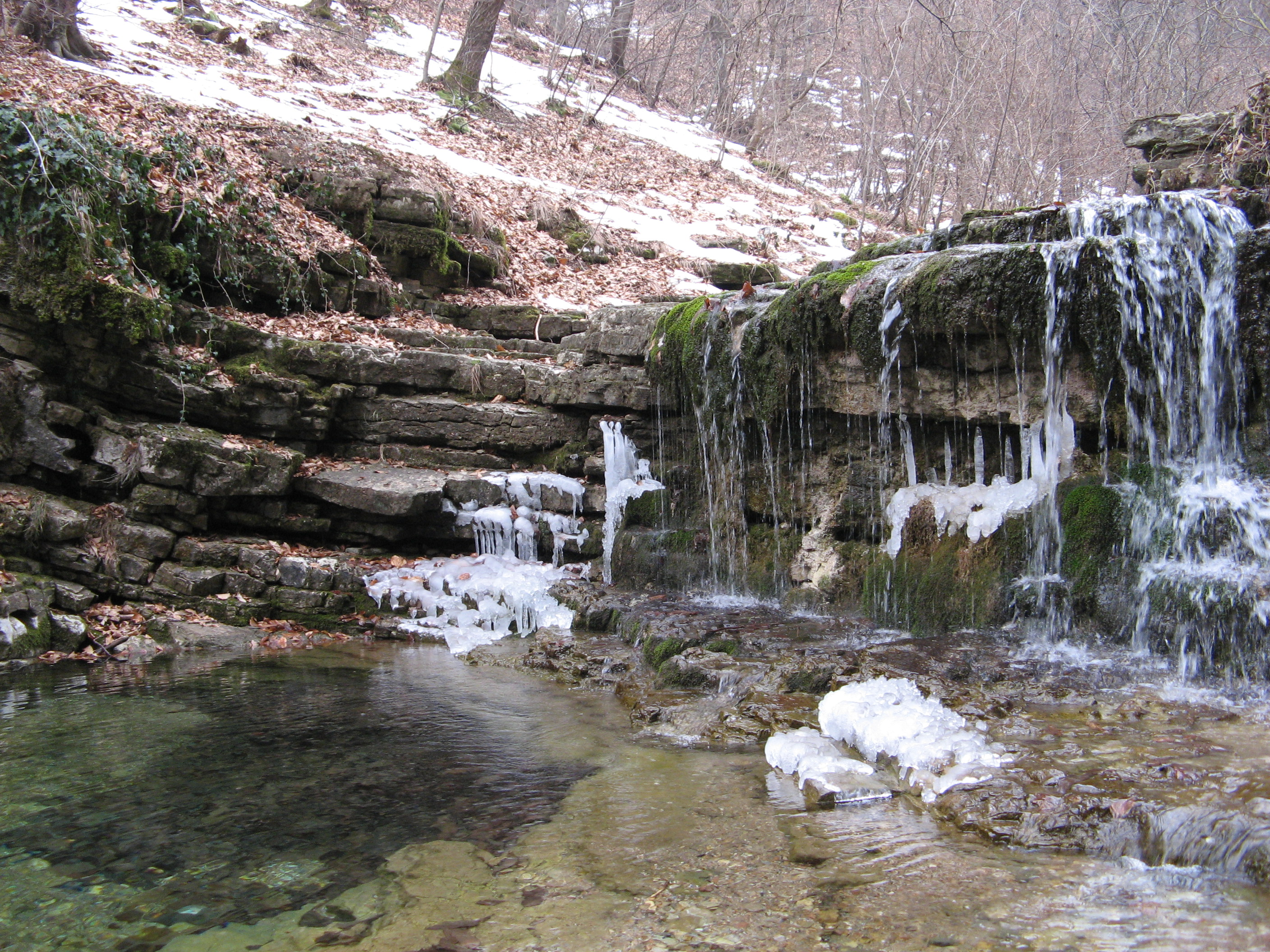 torrente Cosia, by Mark alba